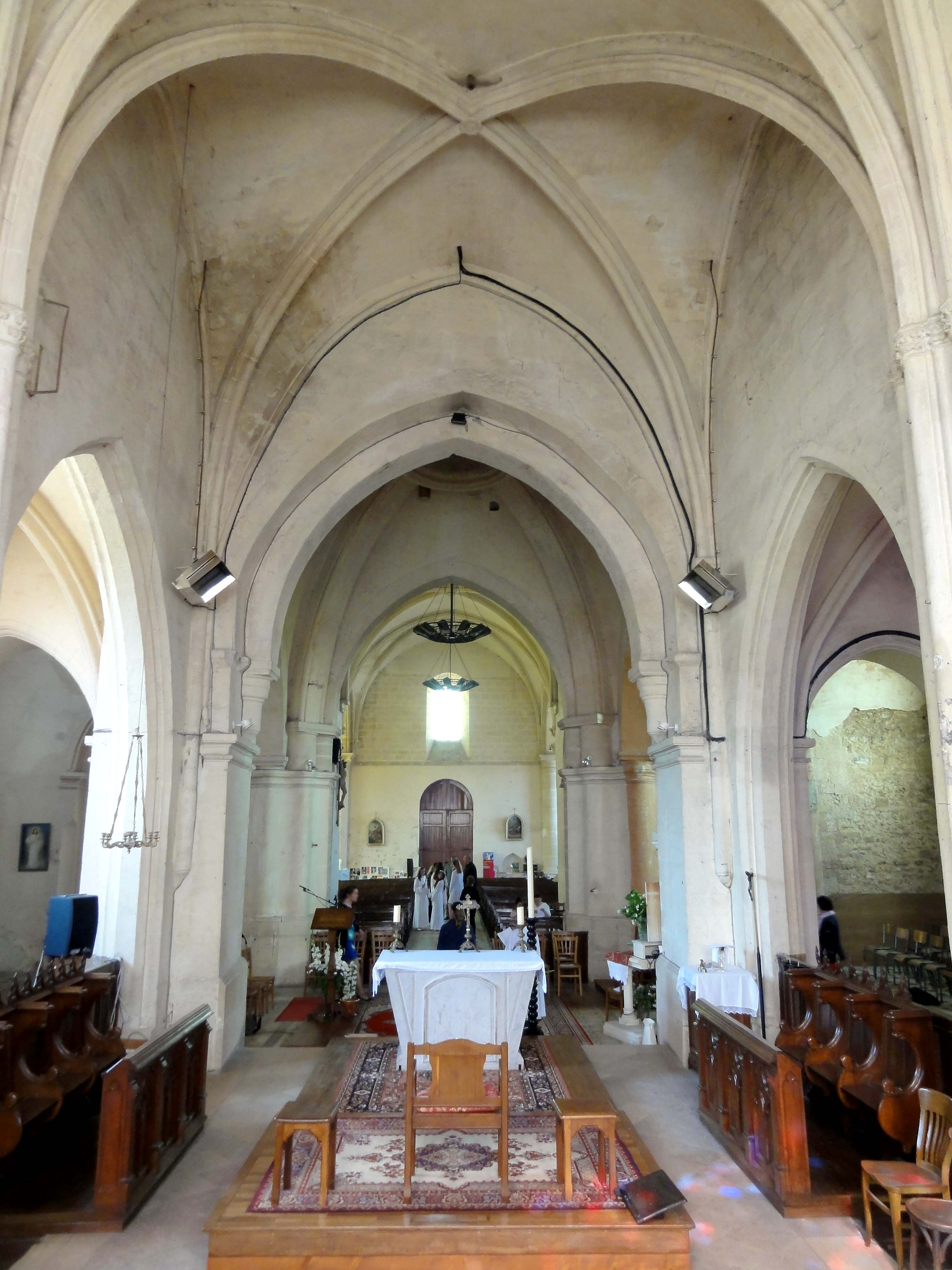 Intérieur de l'église Saint-Vaast de Nointel (voir titre).